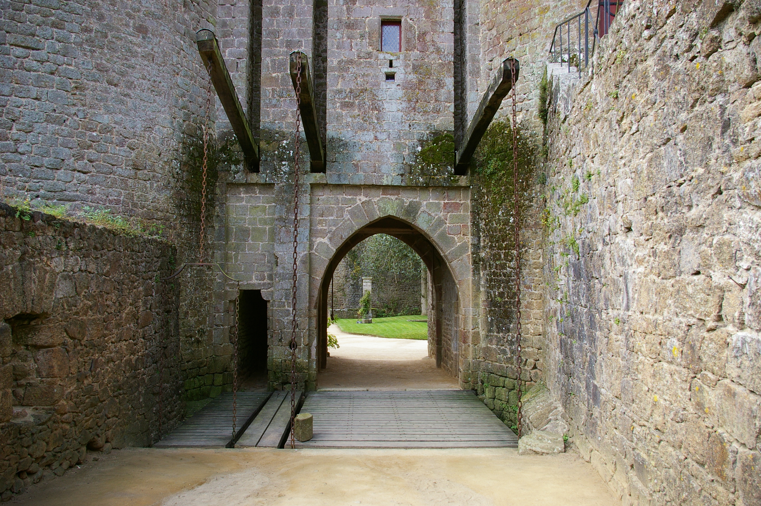 Pont-levis du château de Lassay (Mayenne)